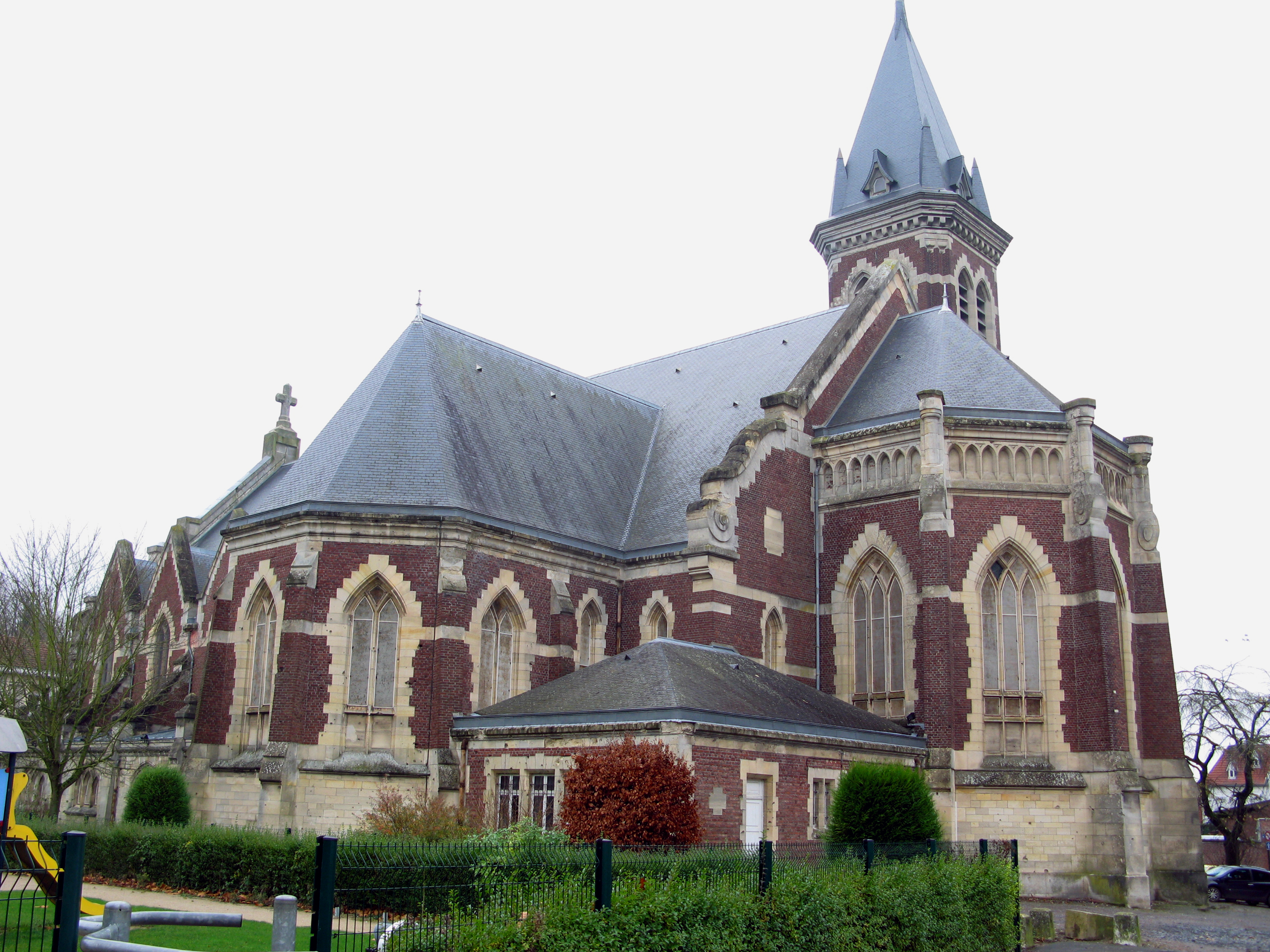 Bapaume (Pas-de-Calais, France) - L'église Saint-Nicolas vue depuis le côté du monument-aux-morts. .